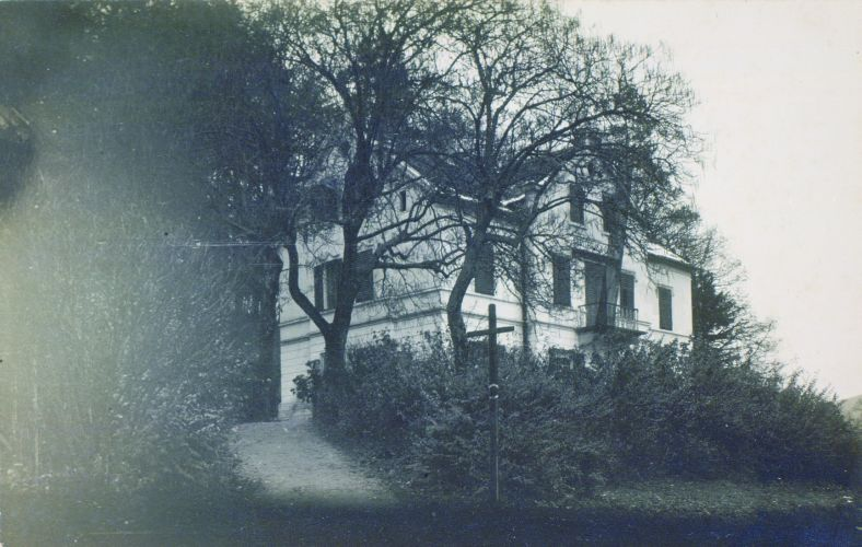 Hiša Josipa Stritarja